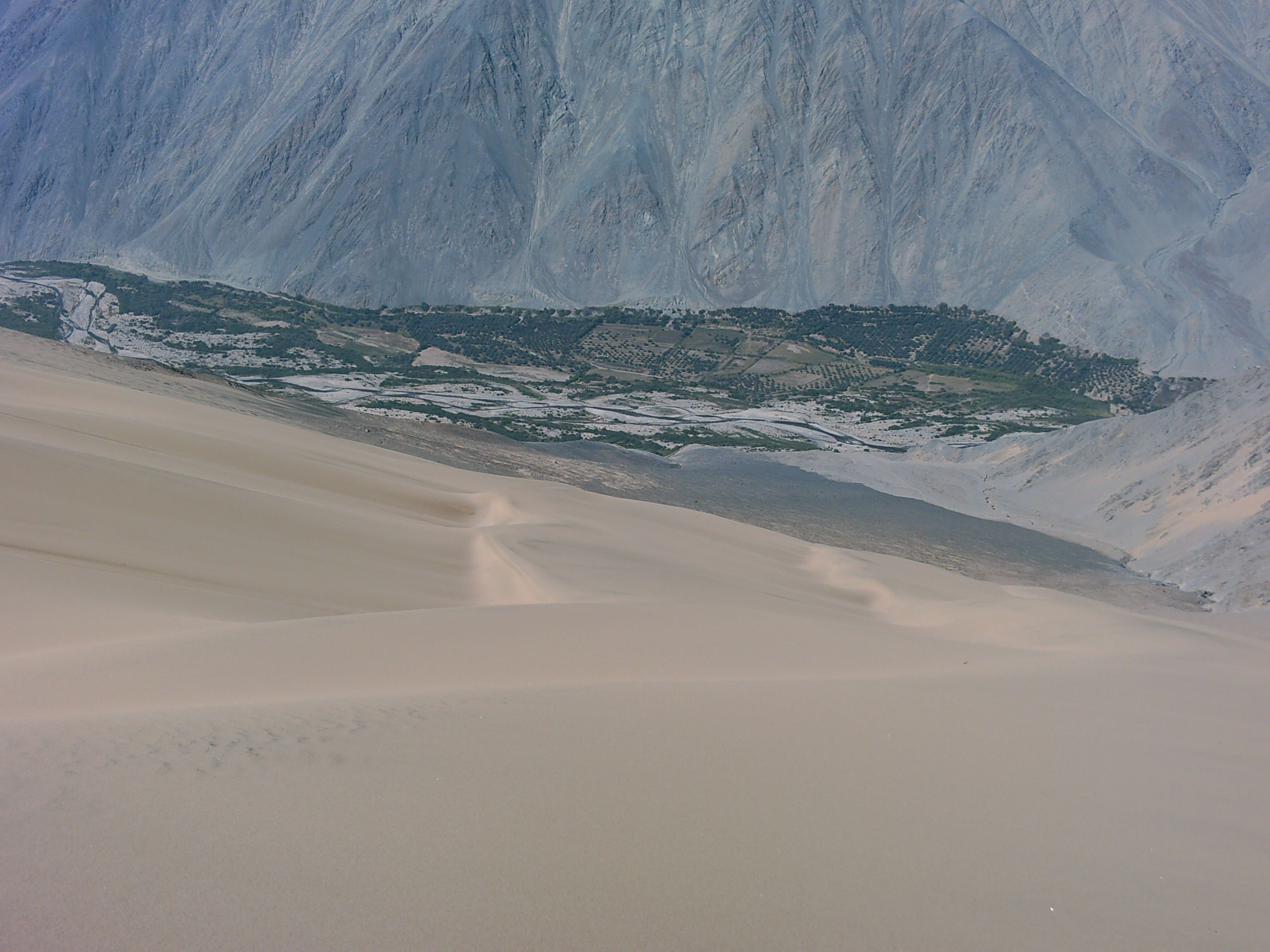 Caravelí Province, Peru